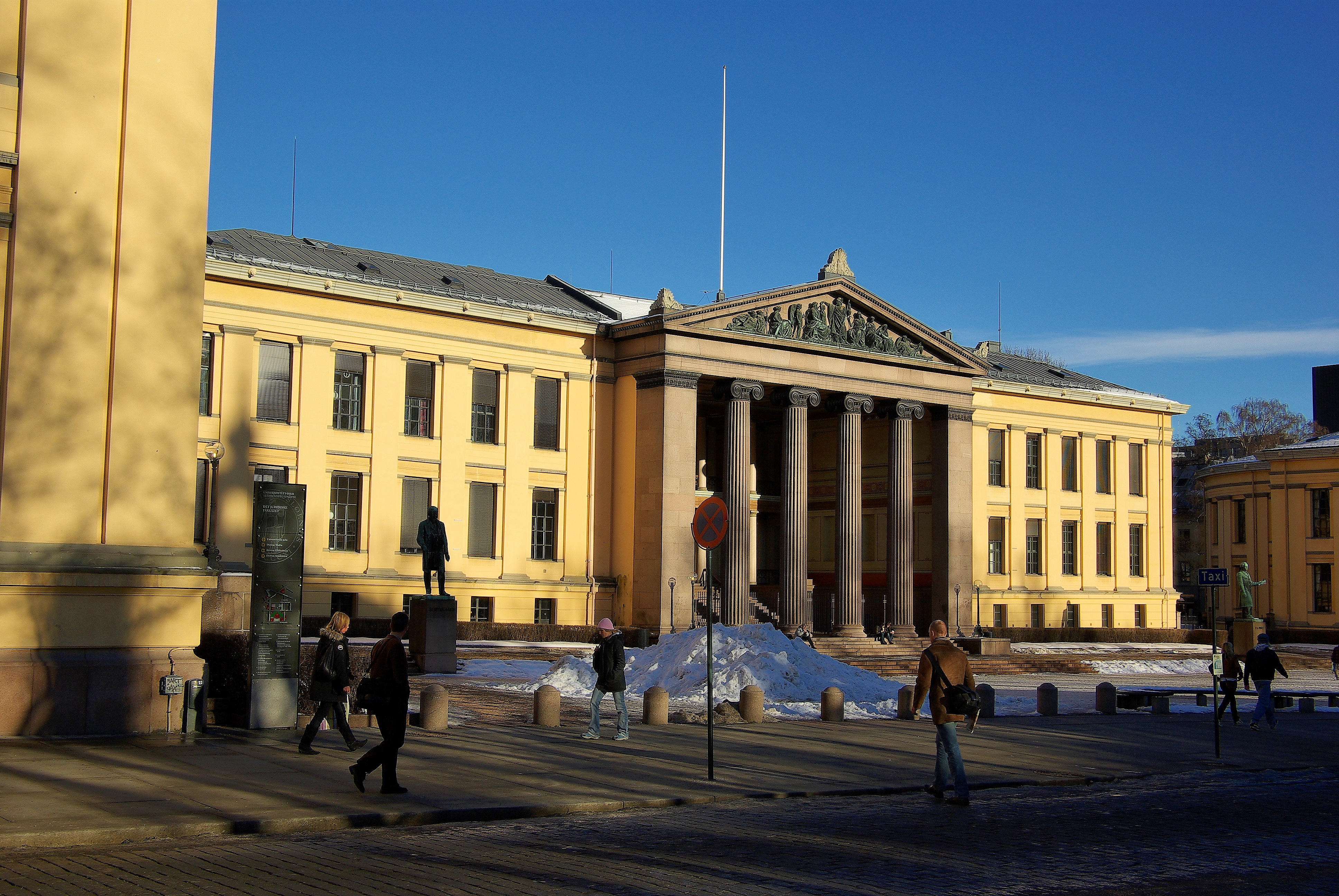 Oslo Universitet, juridisk fakultet, Oslo, Norway.